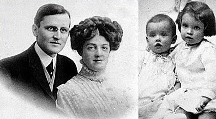 Allison Family